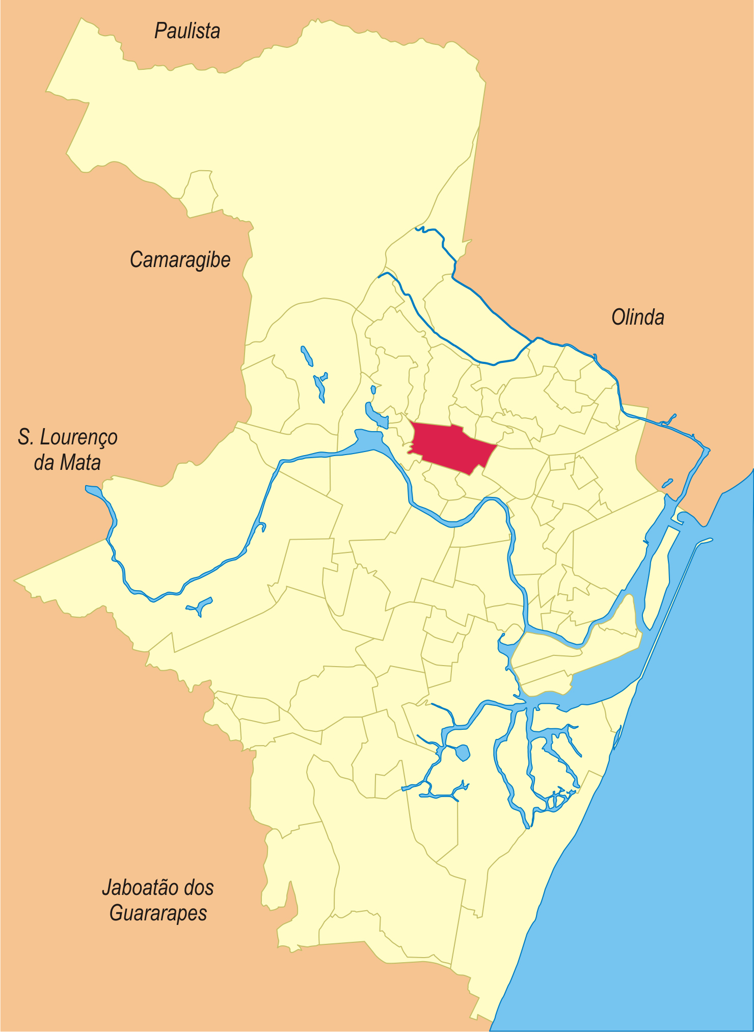 Localização do bairro no Recife